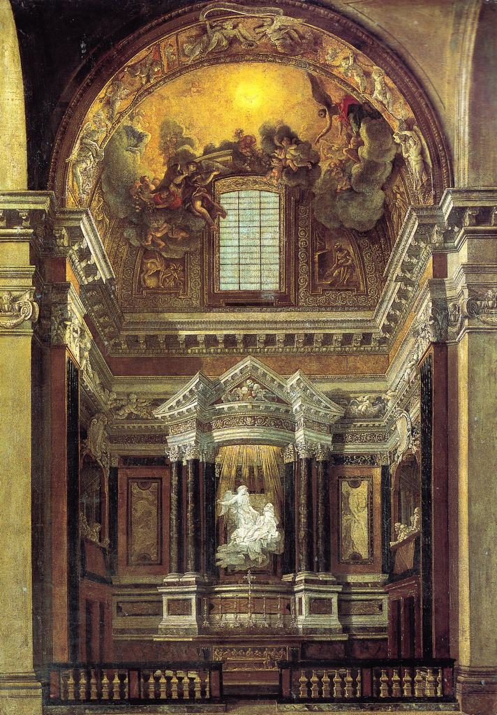 Cappella Cornaro